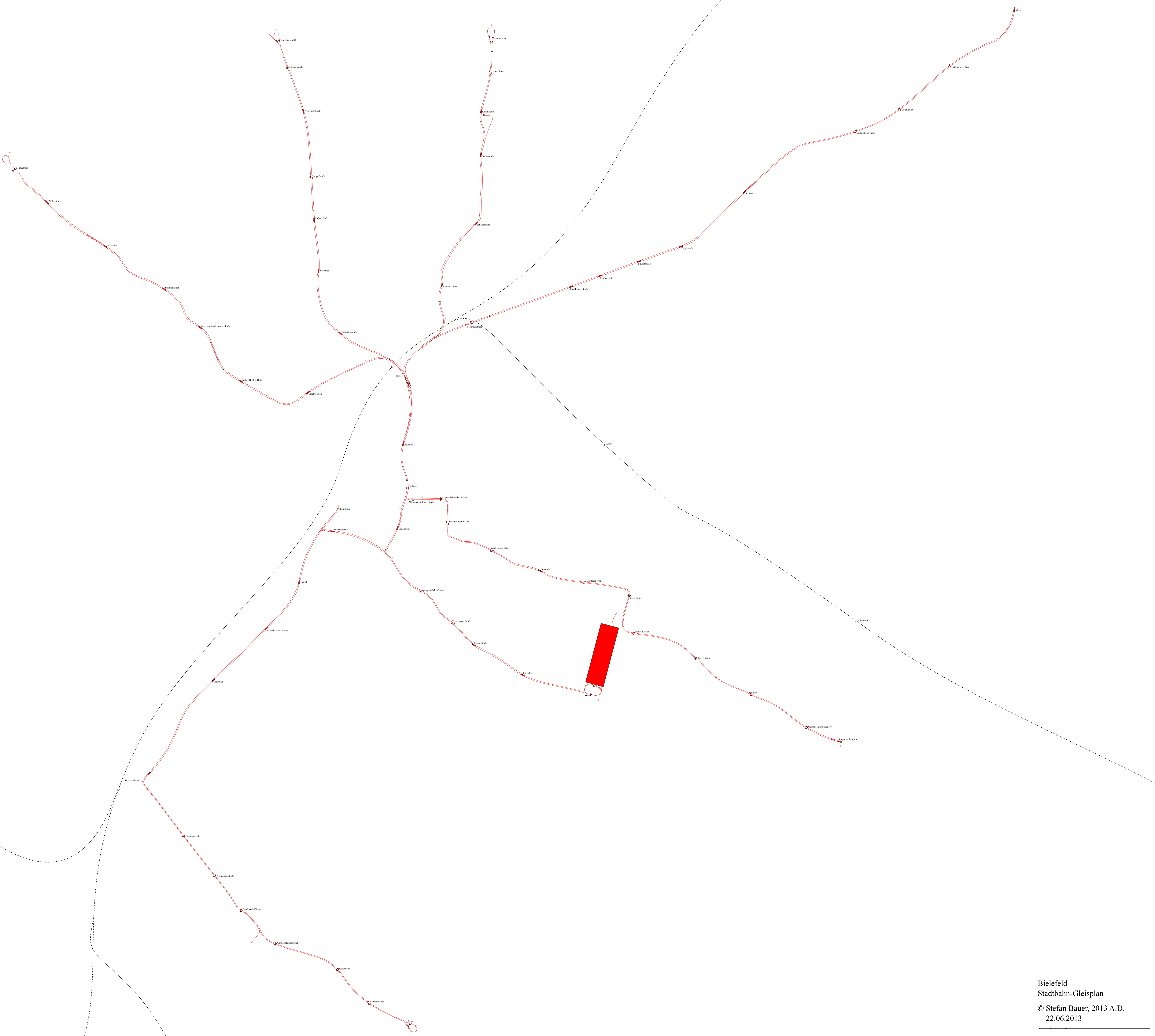 Stadtbahn-Gleisplan Bielefeld 2013